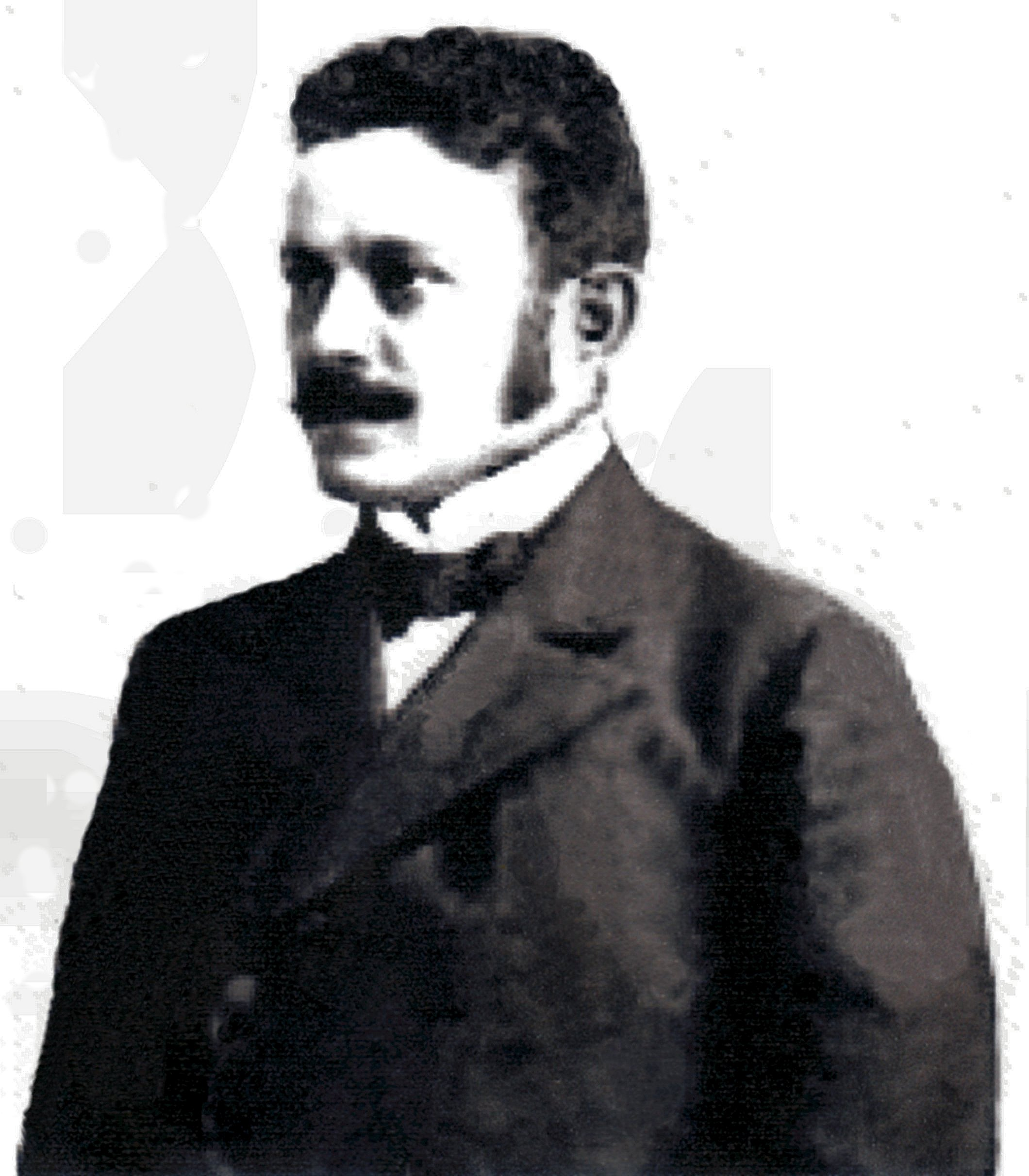 Nikolaus Freiherr von Flondor um 1900